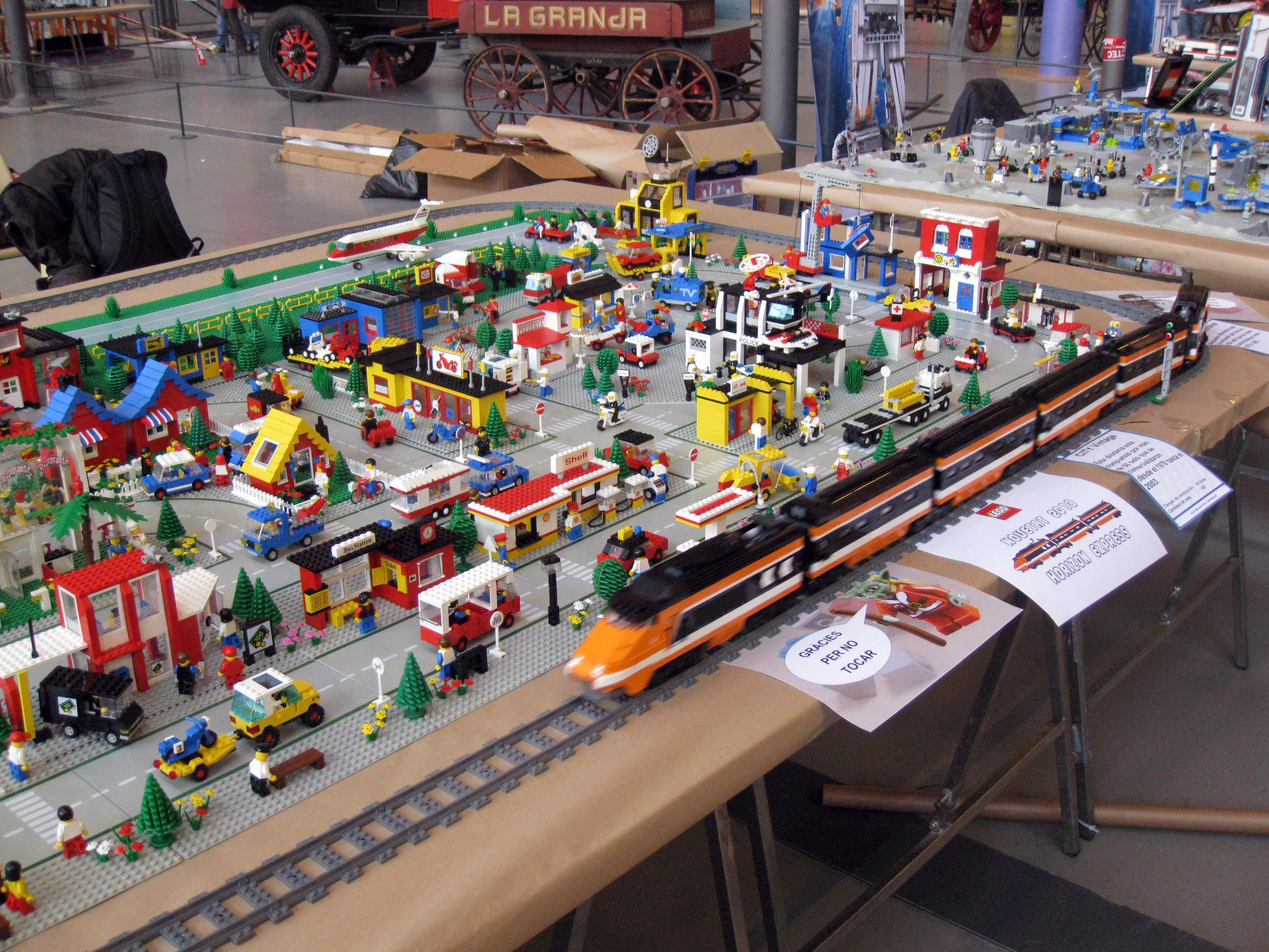 Fàbrica Aymerich, Amat i Jover (Terrassa) Object location41° 33′ 54.49″ N, 2° 00′ 28.14″ E